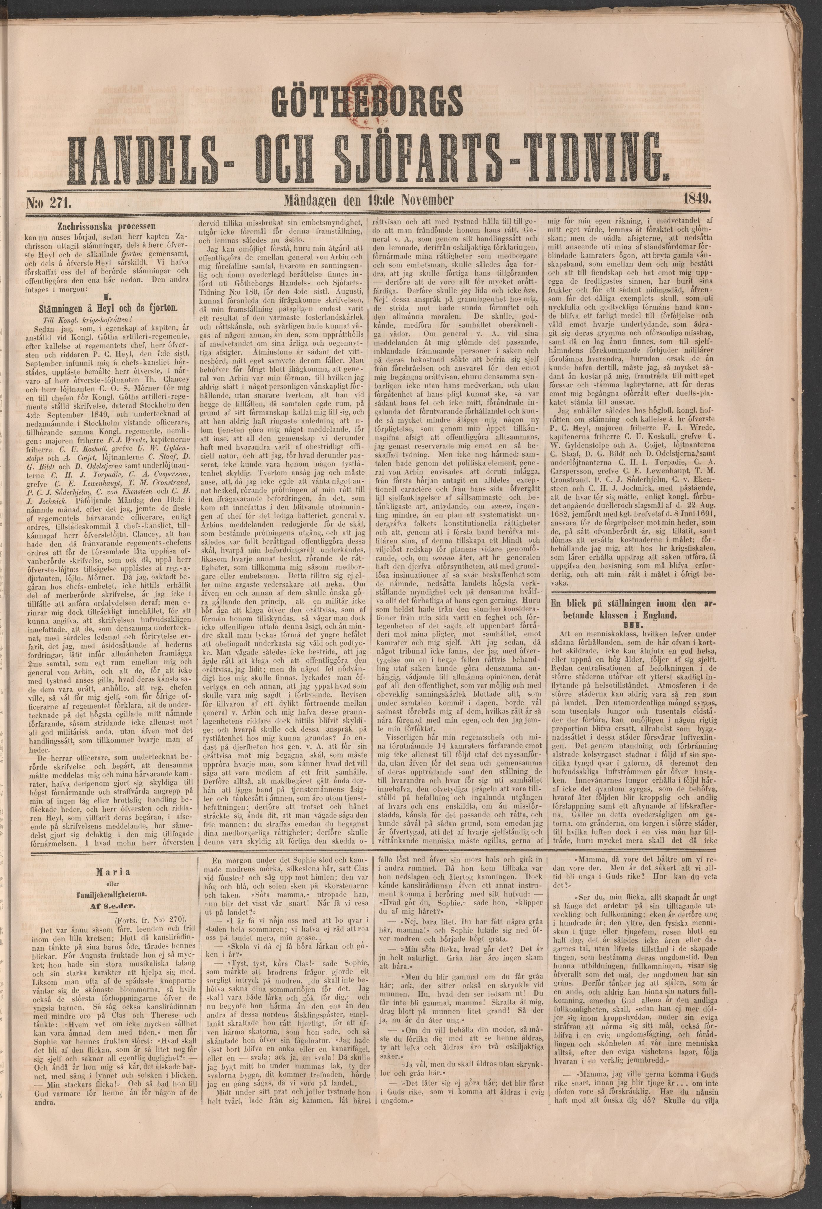 Göteborgs Handels- och Sjöfartstidning 19 november 1849.